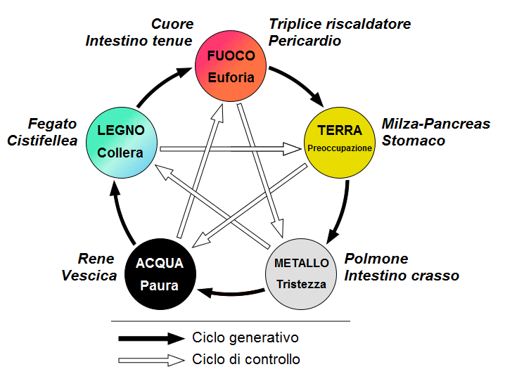 Il ciclo dei cinque elementi secondo la Medicina Tradizionale Cinese, associati alle funzioni degli organi e alle relative emozioni